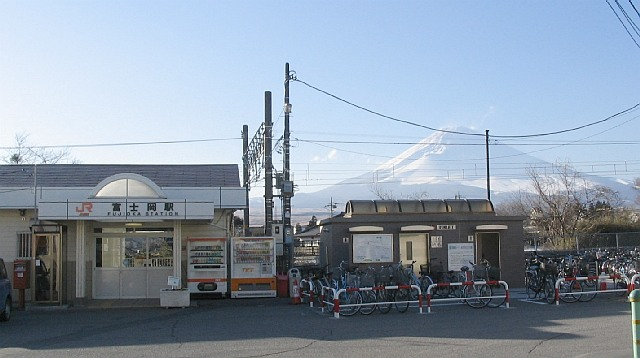 富士岡駅